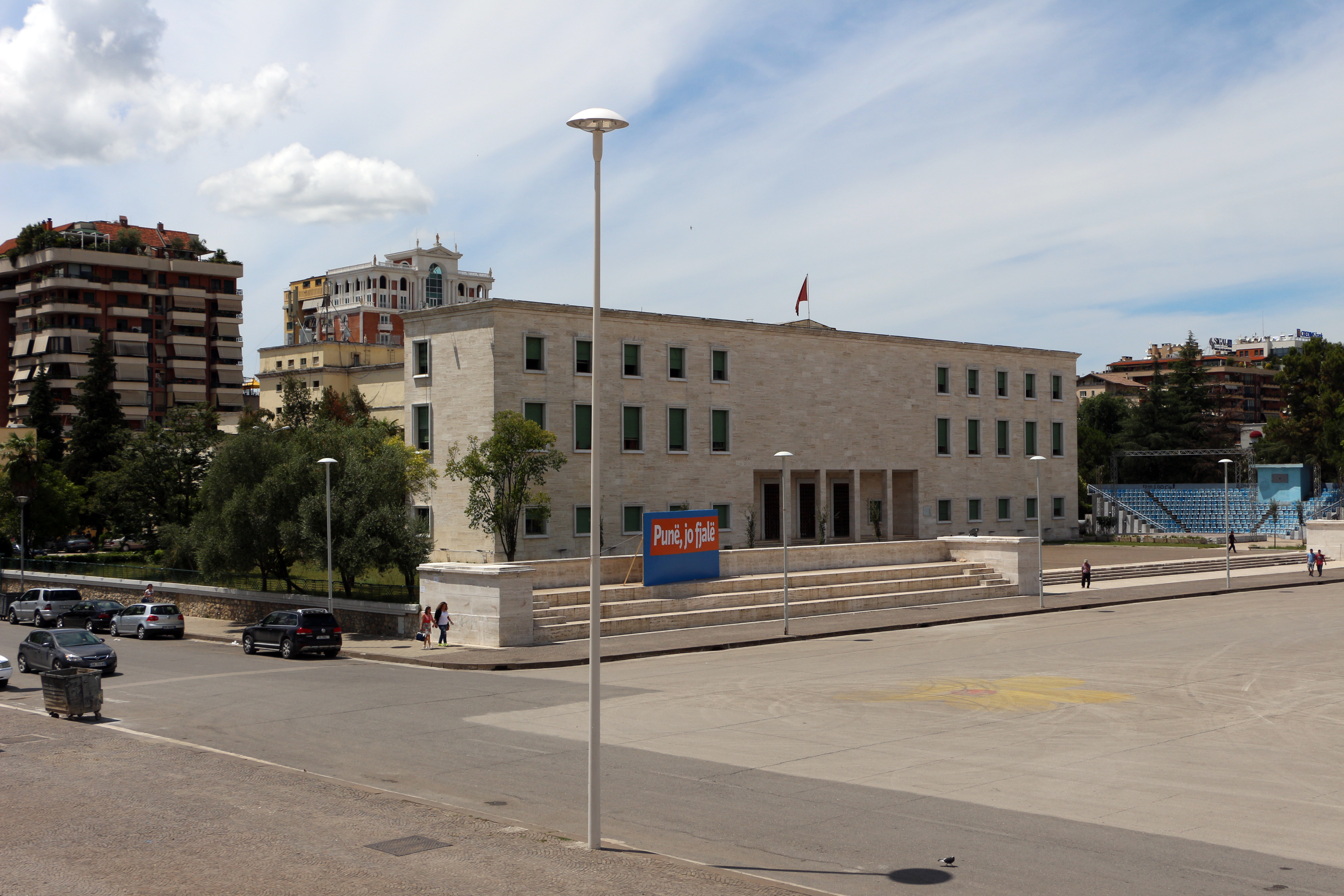 Akademia e Arteve